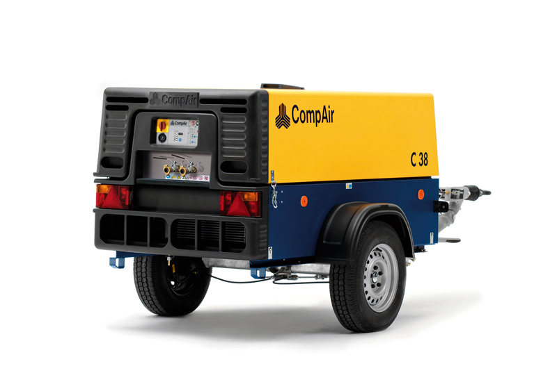 Fahrbarer Kompressor vom Typ C 38 der Firma CompAir